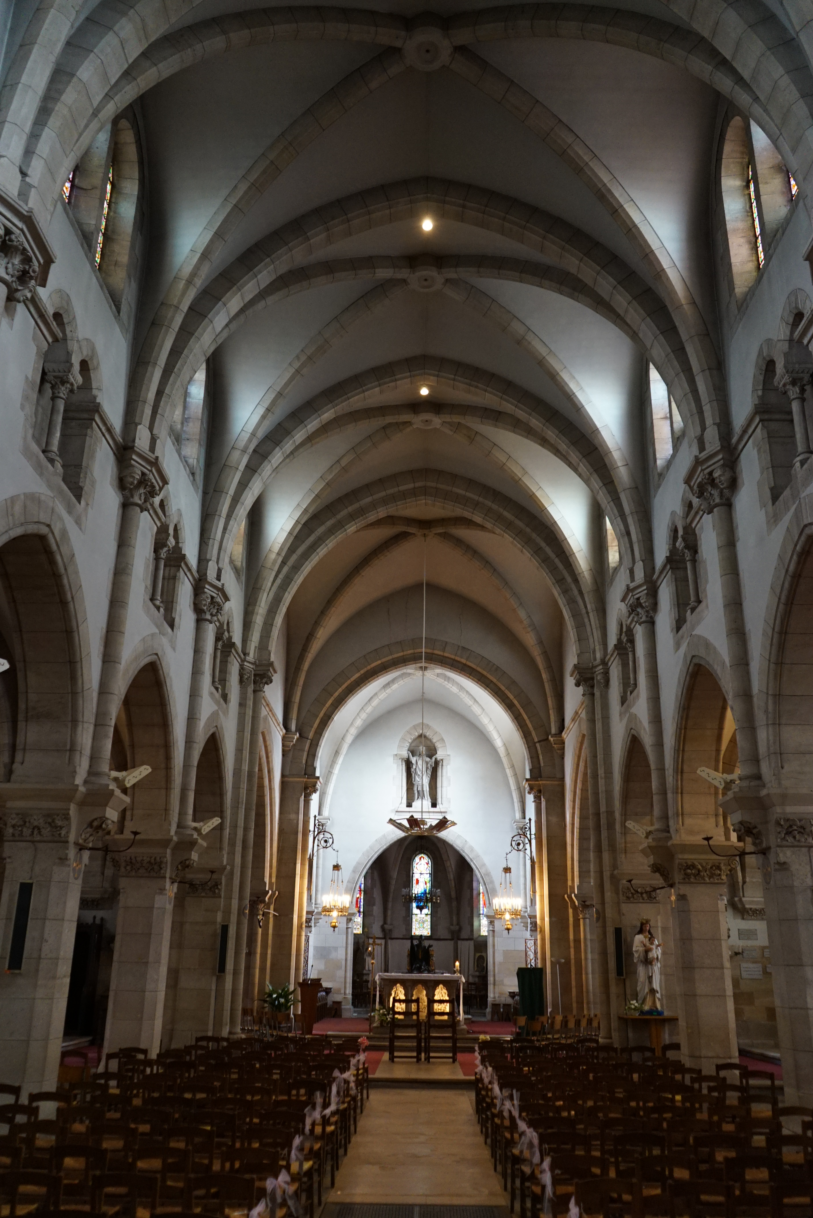 intérieur de l'Église Saint-Memmie de Saint-Memmie.